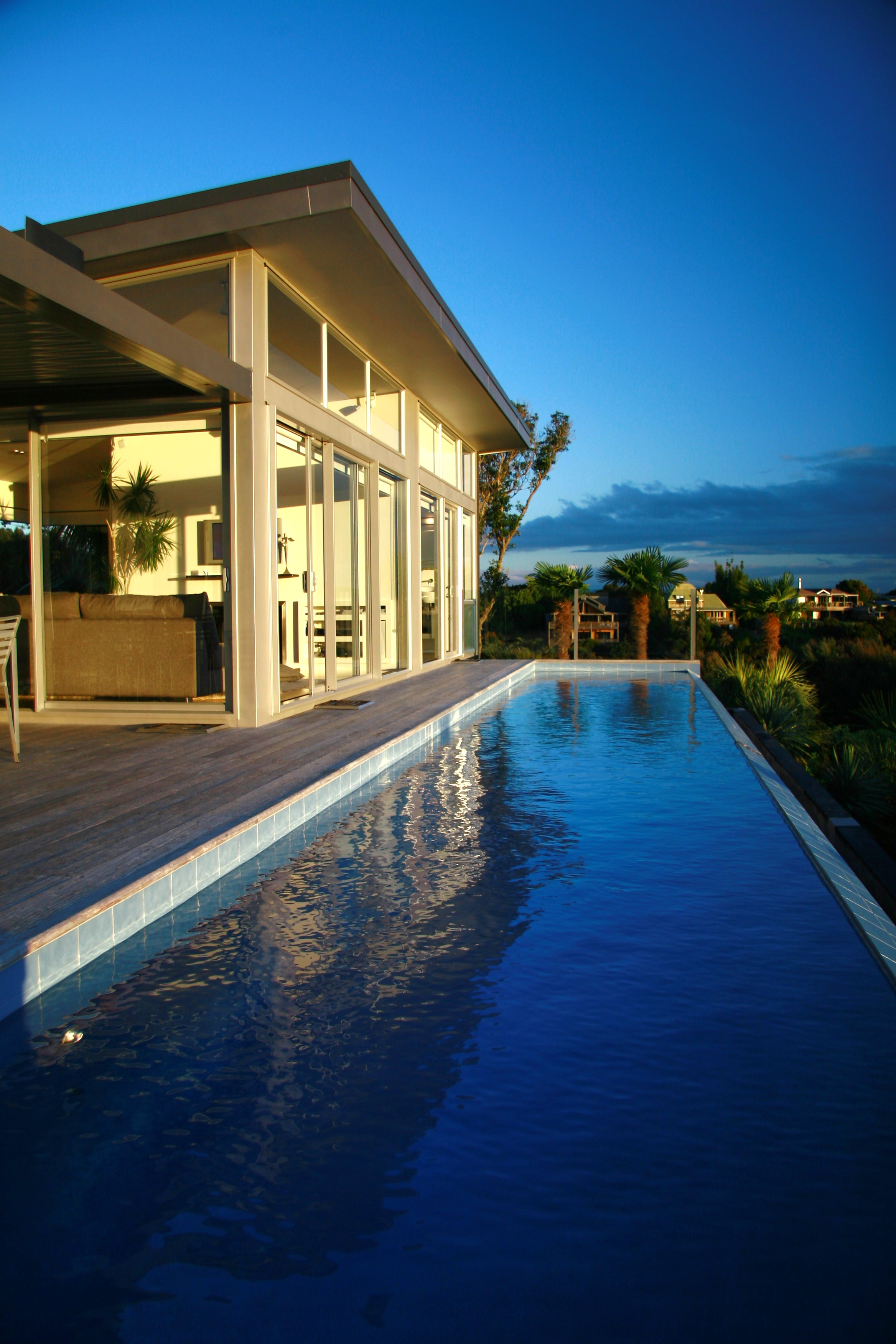 Eagles Nest NZ